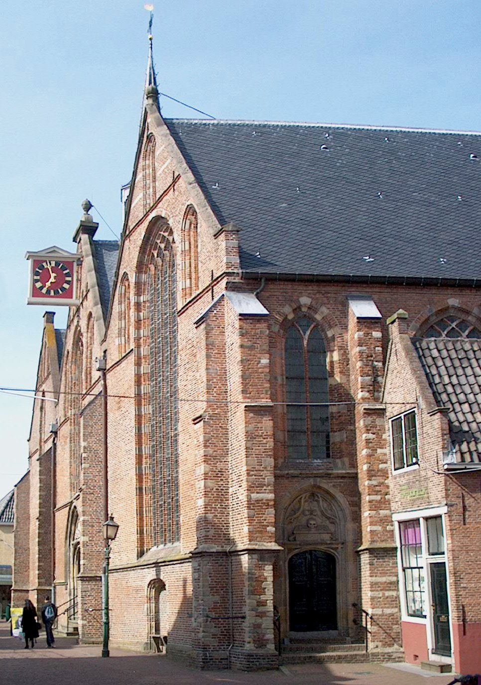 Hoorn, Noorderkerk, westgevel a.h. Kleine Noord